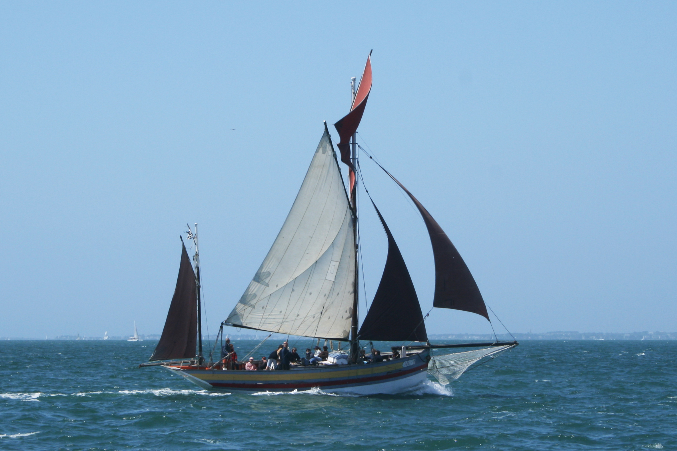 Madelynn